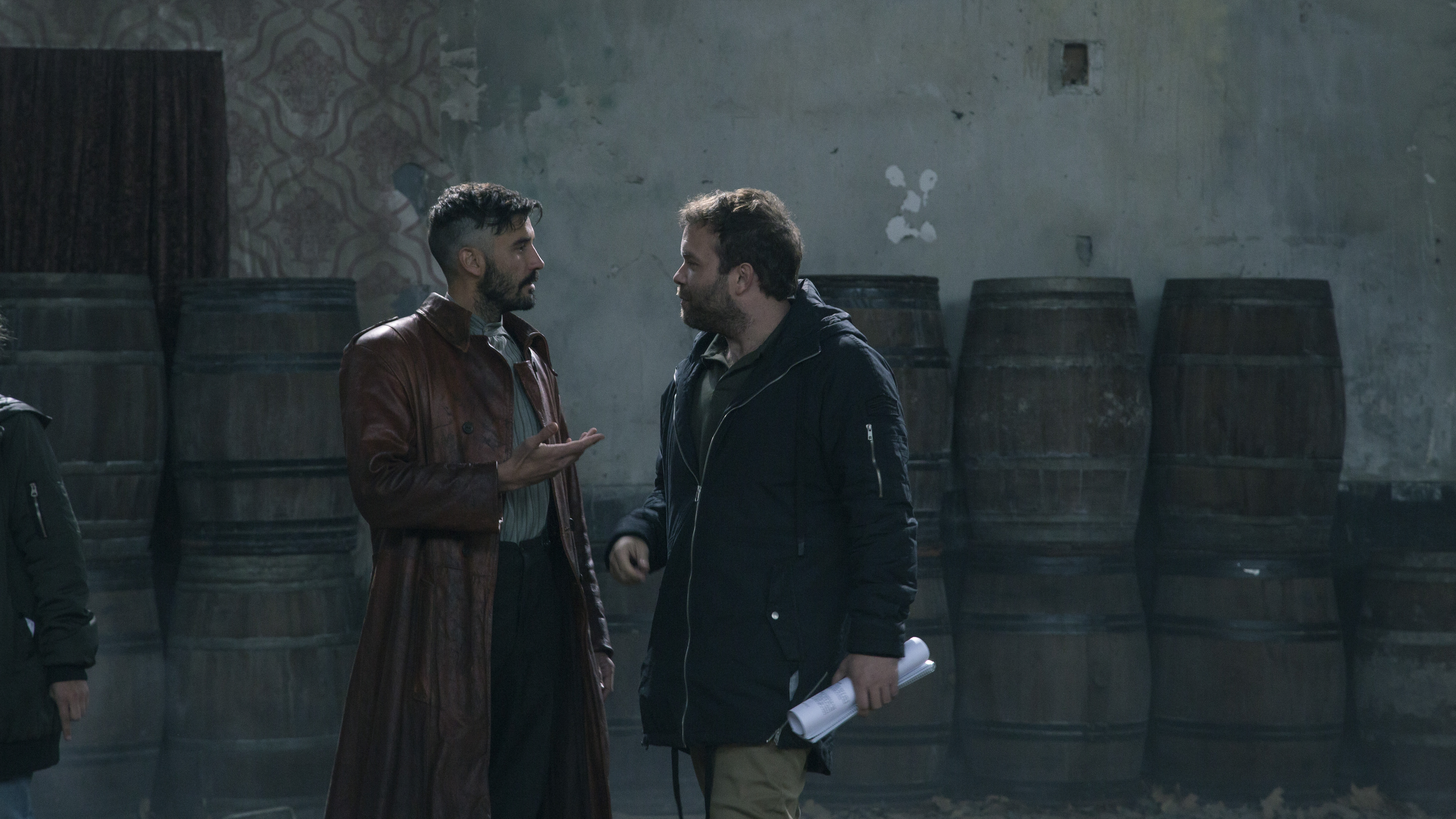 Frank Ariza durante el rodaje de la serie El Continental